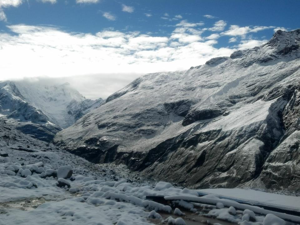 Quebrada Honda - Provincia de Carhuaz